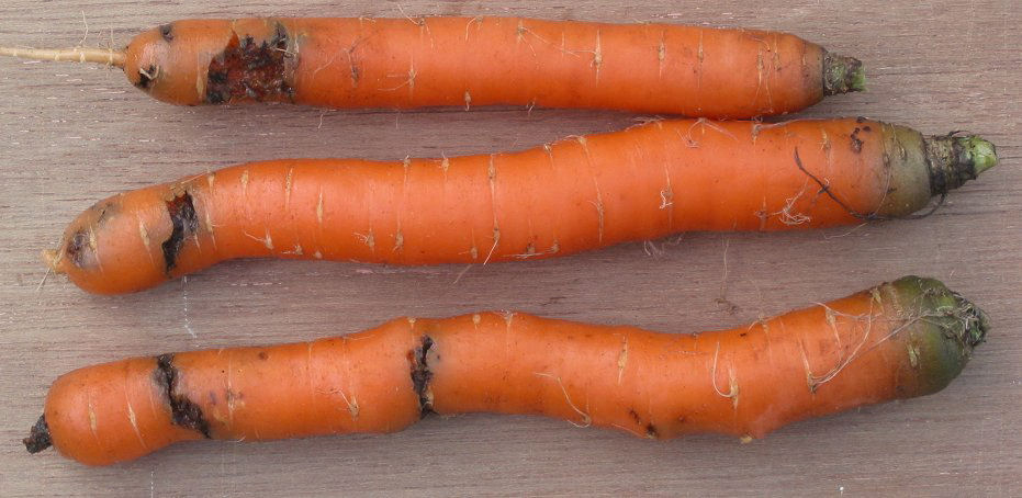 Late aantasting van peen (Daucus carota) door wortelvlieg (Chamaepsila rosae) bij Amsterdamse Bak; eind oktober